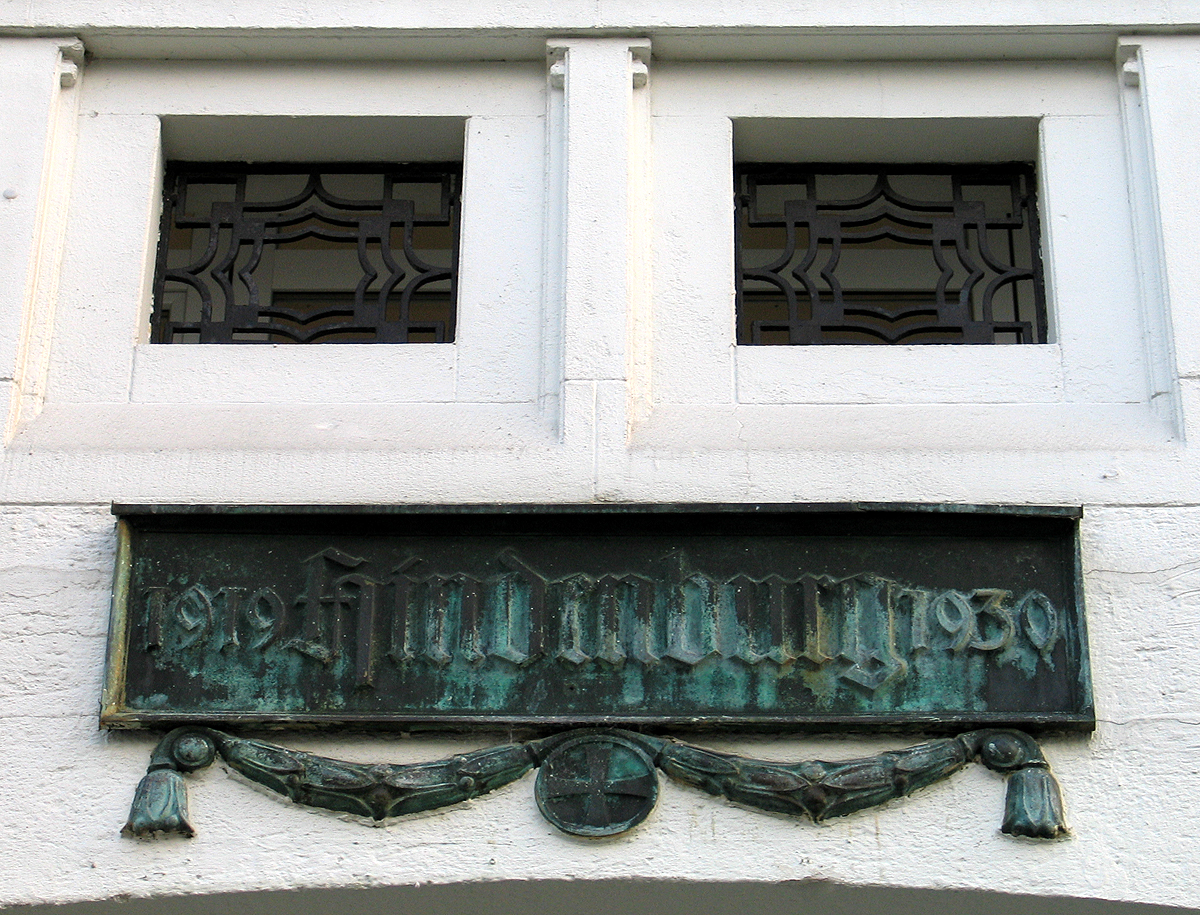 Erinnerungstafel an den Generalfeldmarschall und späteren Reichspräsidenten Paul von Hindenburg über dem Eingang der Villa Hindenburg, Bristoler Straße 6 Ecke Ludwig-Barney-Straße, im sogenannten Hindenburgviertel (eigentlich: Zoo) ; die Jahreszahlen 1919 und 1930 am Wohnsitz des Namensgebers des Hauses weichen von den Daten in der Literatur ab ...